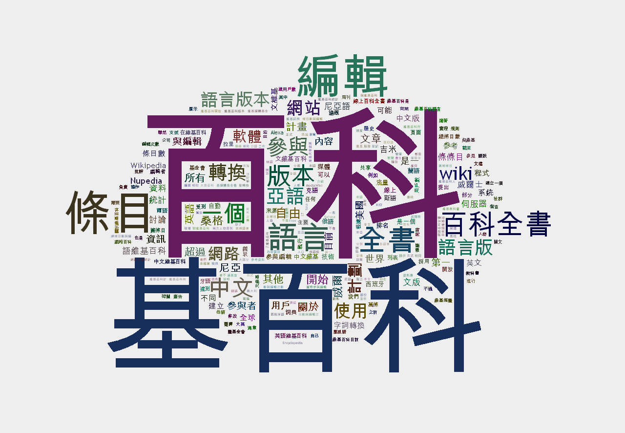 用中文维基百科上的维基百科条目生成的HTML文字云